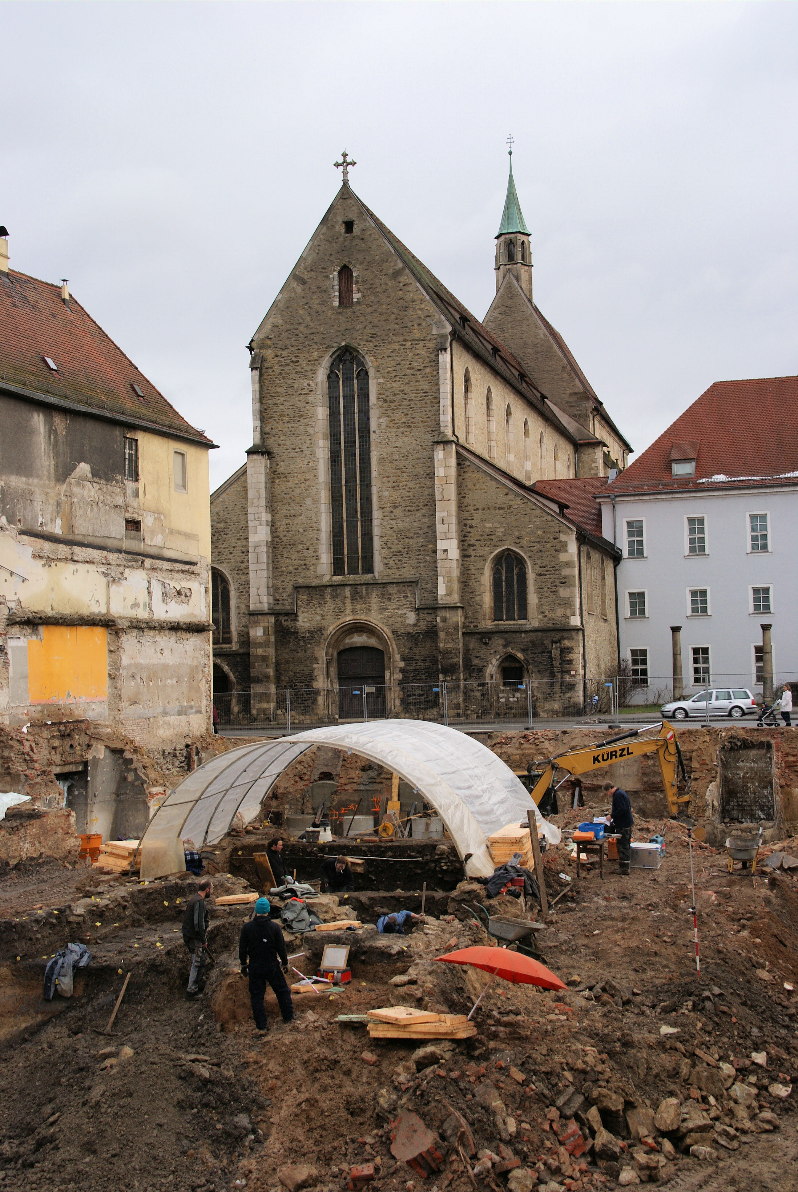 Ausgrabungen auf dem Gelände des abgerissenen Hotels Karmeliten, Regensburg.